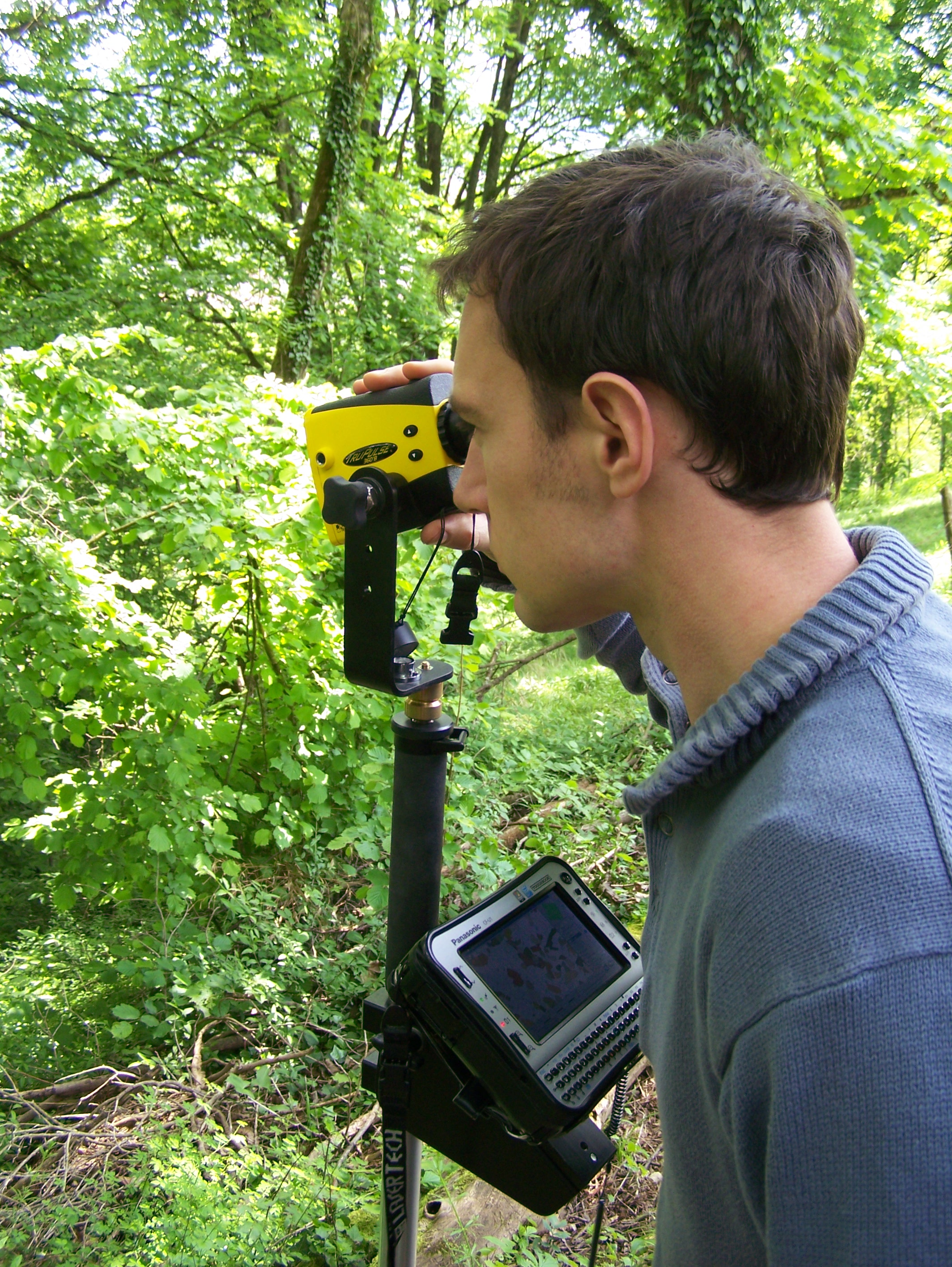 Field-Map - technologie utilisée pour la cartographie, collecte et le traitement des données de terrain. L'image présent laser télémètre TruPulse 360B et l'ordinateur de terrain Panasonic CF-U1.